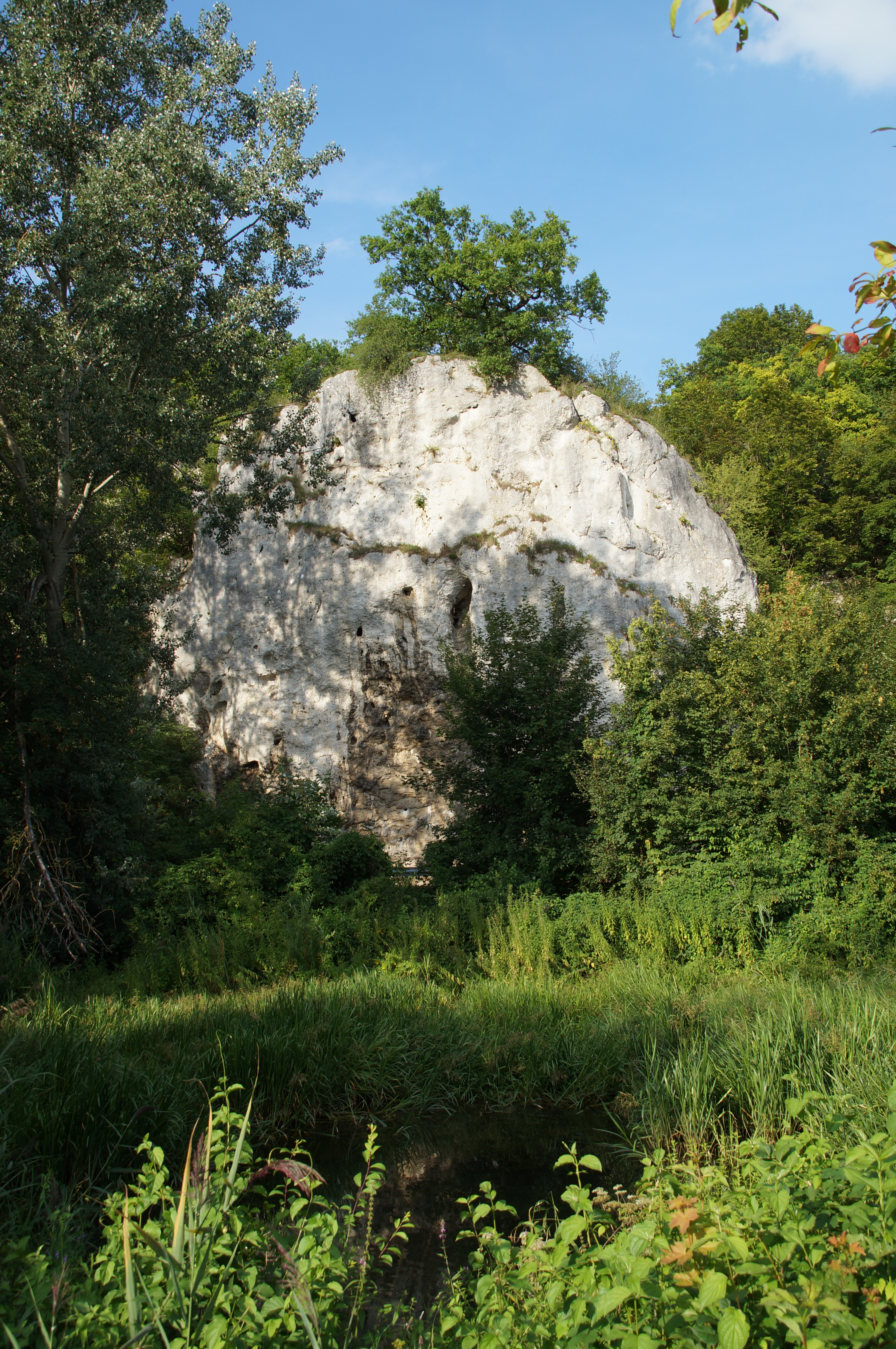 Felshang mit Halbhöhlen bei Pentling, in der Nähe der Autobahnbrücke, Geotop-Nummer: 375R024